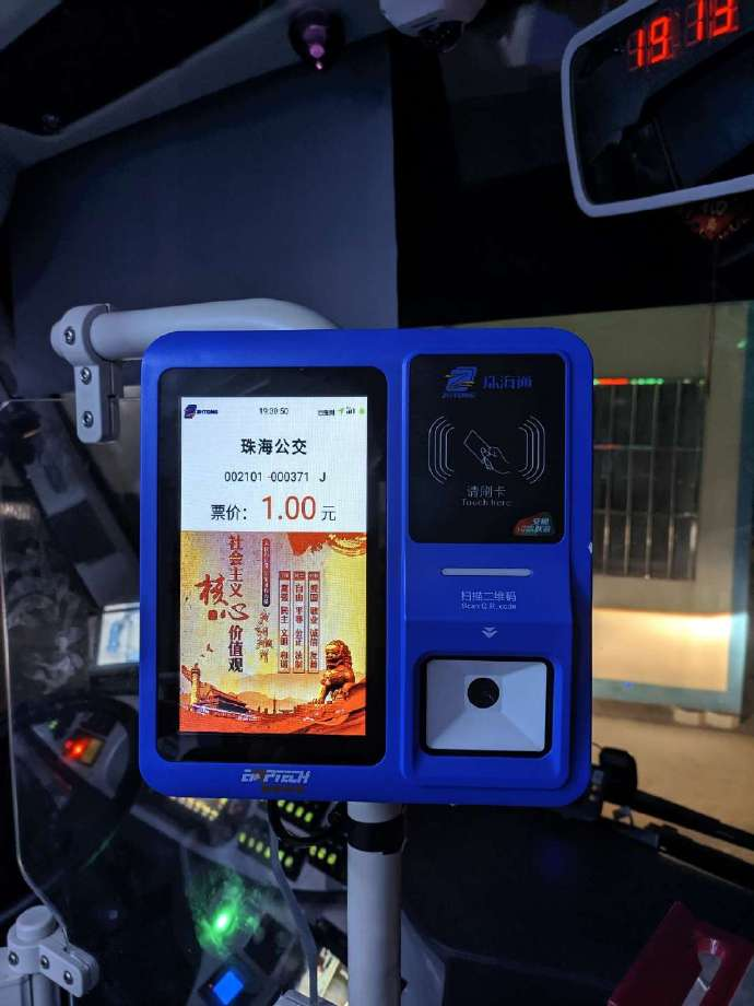 珠海公交2019年新款刷卡機，採用與深圳市同款的雄帝EMP5211 Android系統刷卡機。